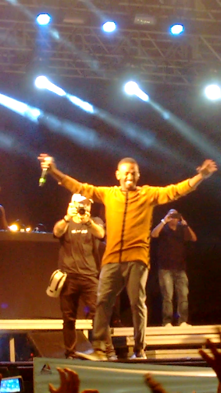 Nego do Borel se apresentando em Mongaguá São Paulo